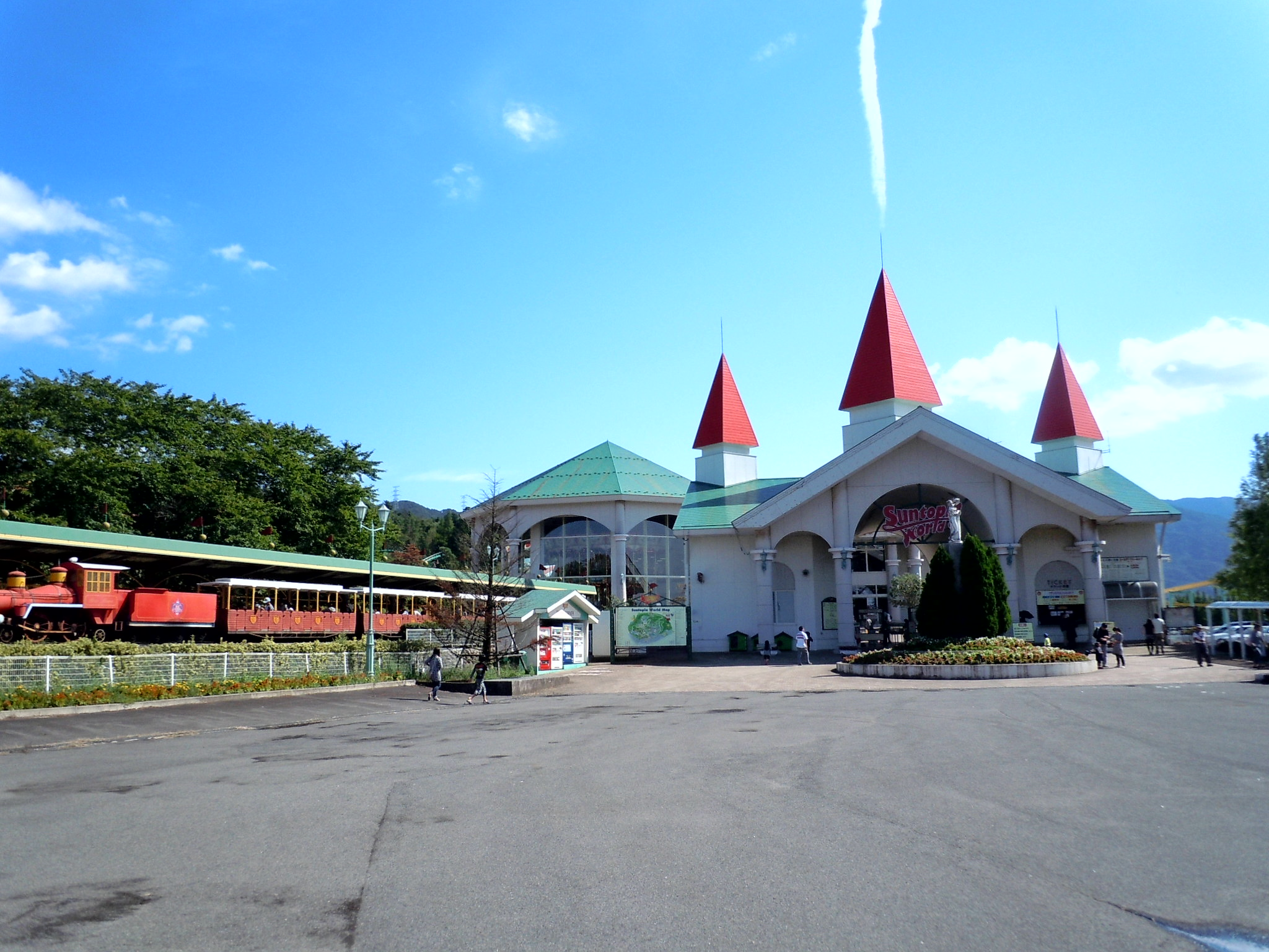 サントピアワールドメインゲート付近